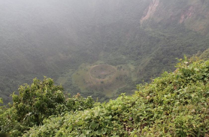 Cráter Boquerón y Cráter Boqueróncito en el Volcan San Salvador (Crater Boqueron with inner crater Boqueroncito in San Salvador Volcano) El Salvador, Central America